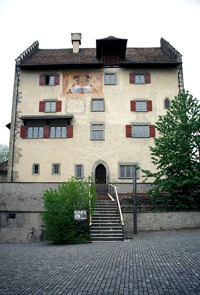 Schloss Greifensee, Kanton Zürich, Schweiz